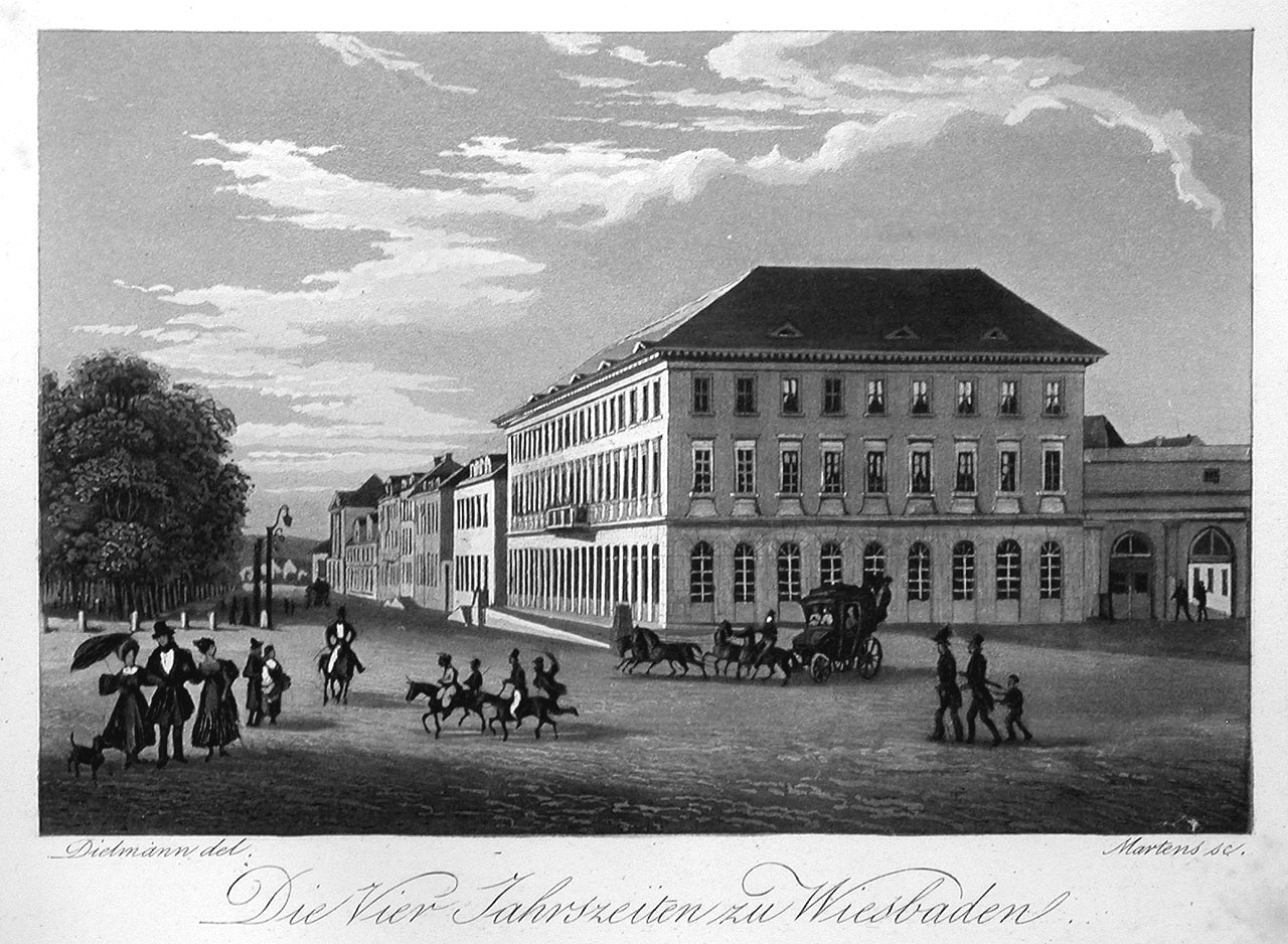 Blick auf das ehemalige Wiesbadener Hotel und Badhaus "Vier Jahreszeiten", erbaut von Christian Zais, um 1830, Wiesbaden, Deutschland. Originaltitel des Blattes: Die Vier Jahreszeiten zu Wiesbaden 1830 Aquatinta auf Papier, schwarz-weiß